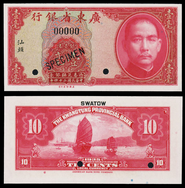 廣東省銀行在汕頭發行的壹毫銀毫券。中華民國政府對汕頭的英文譯名是「Swatow」，以潮汕話發音，是福建話拼音（Hokkien Spelling System）的一種。